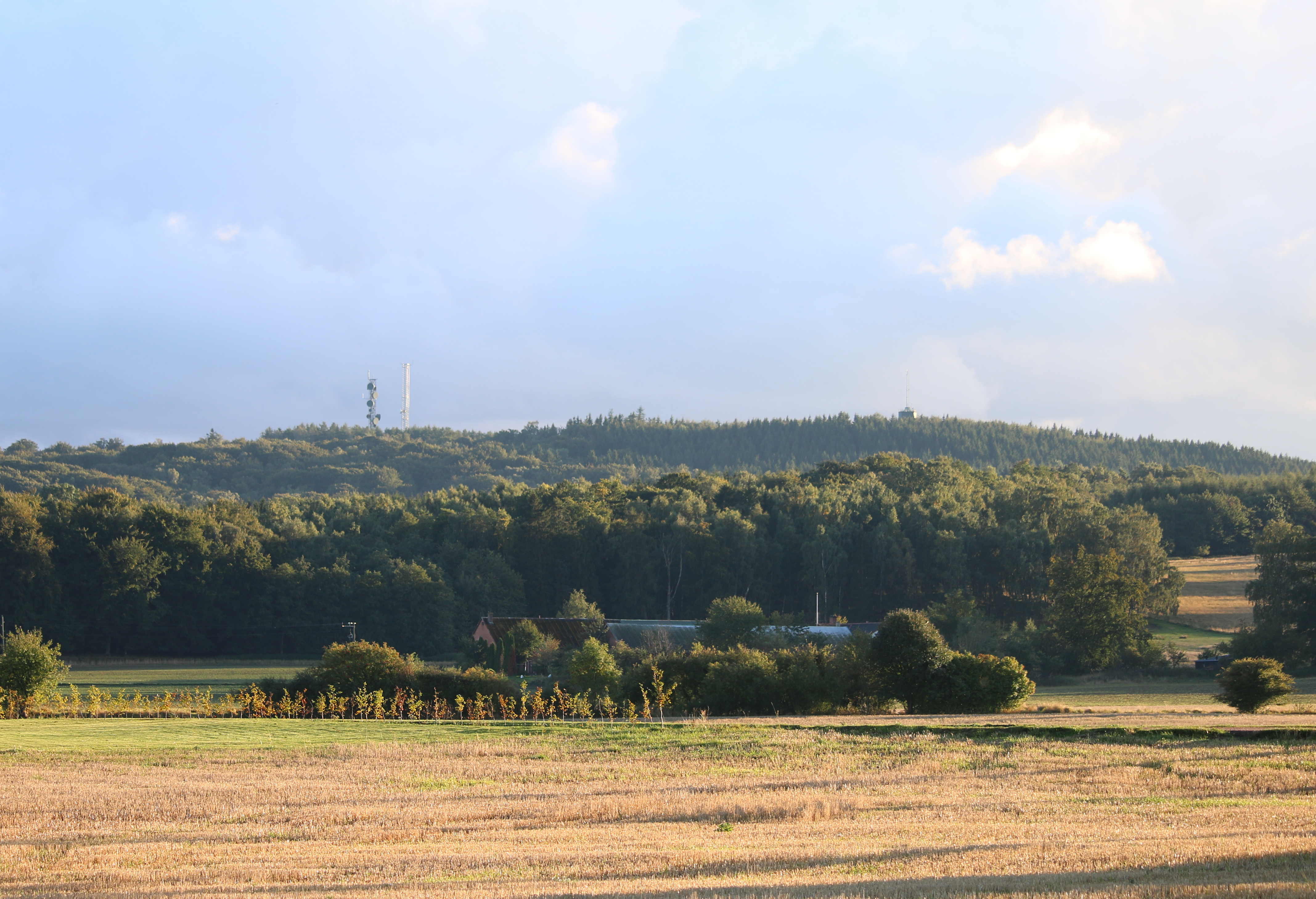 Romeleklint från norr